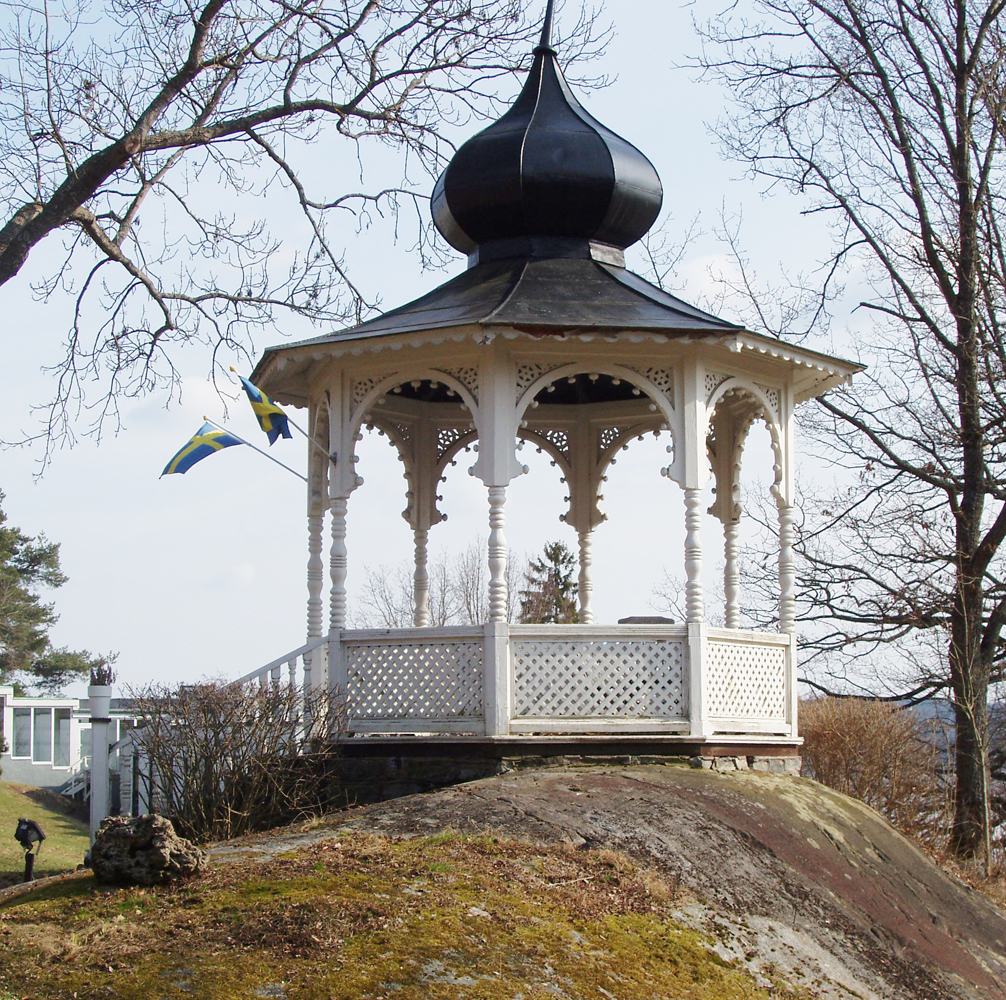 Lusthus på en bergknalle i trädgården till konferensanläggningen Lovik på norra Lidingö. Ursprungligen uppfört av häradshövding Cronhom på 1890-talet i samband med att han lät bygga Villa Metsola på platsen.